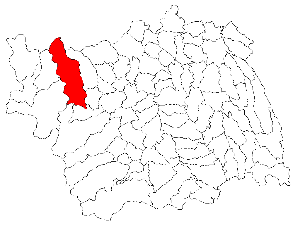 Categorie:Hărţi ale judeţului Bacău